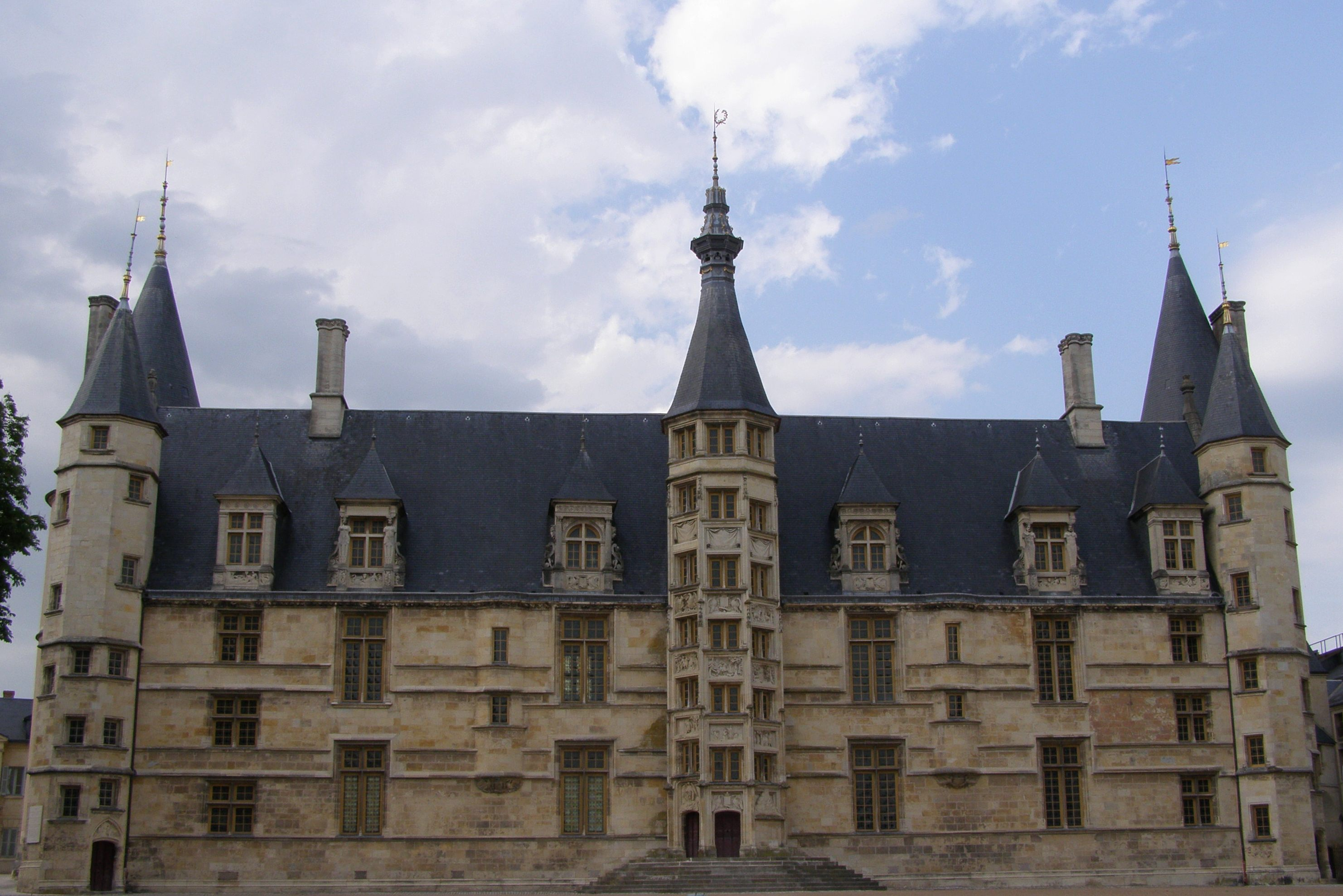 Palais Ducal de